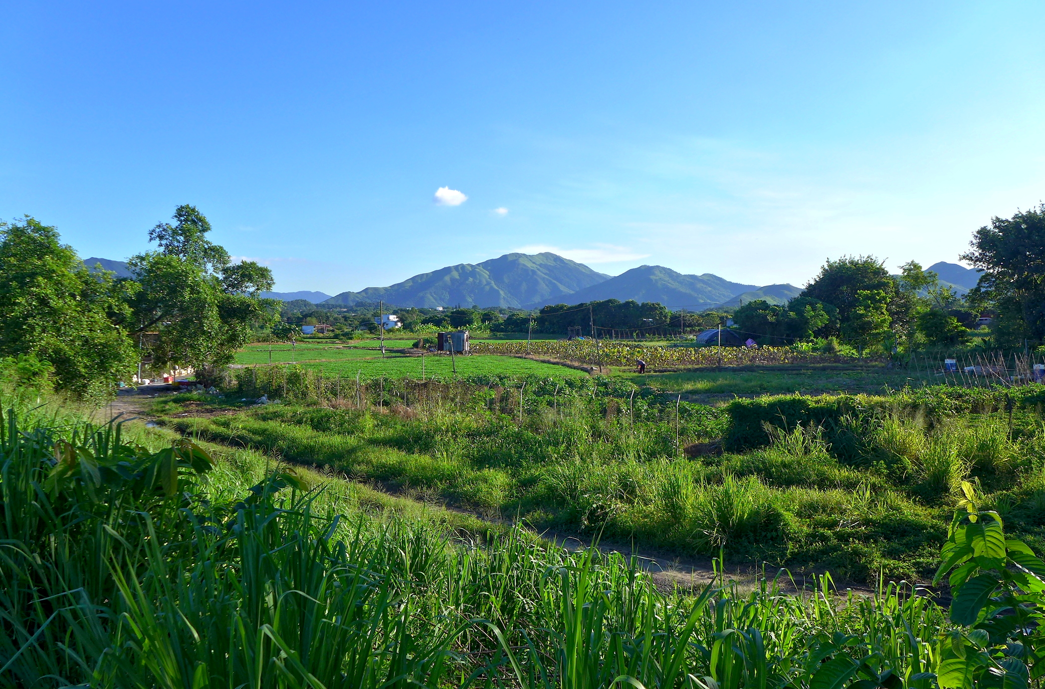 Long Valley